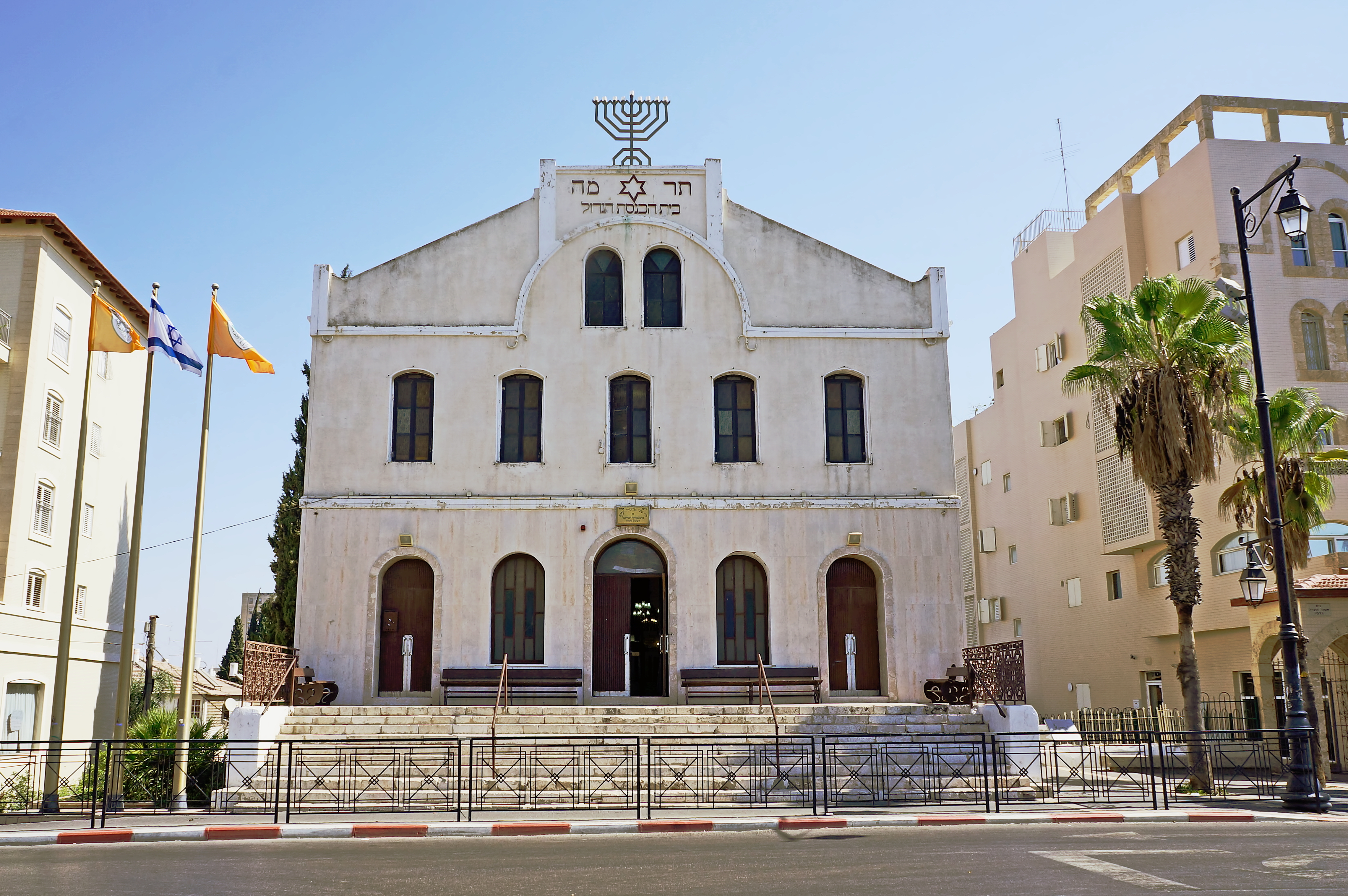 בית הכנסת הגדול בראשון לציון נבנה בשנים 1885–1889, והיווה מוקד חשוב בחיי המושבה. בית הכנסת ניצב על פסגת גבעה, בקצה רחוב רוטשילד וכיכר המייסדים במפגש עם רחוב אחד העם, והוא בולט למרחוק. This is a photo of a heritage building in Israel. Its ID is 9-8300-011